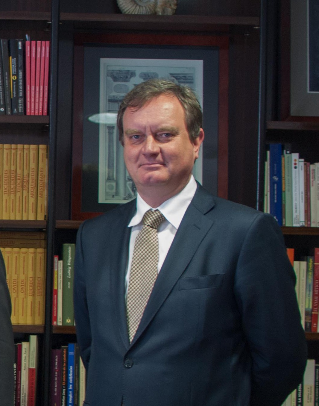 Suursaadik Toomas Kahur Andorras Eesti aukonsulaadi avamisel